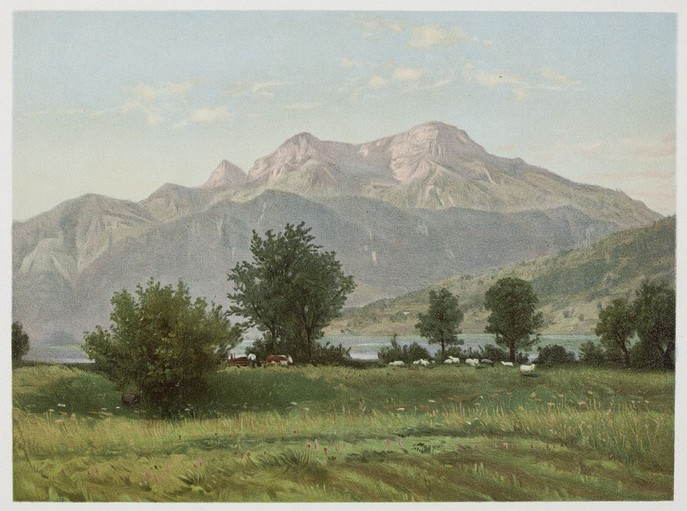 The Schafberg, from Steinbach (alternate version)